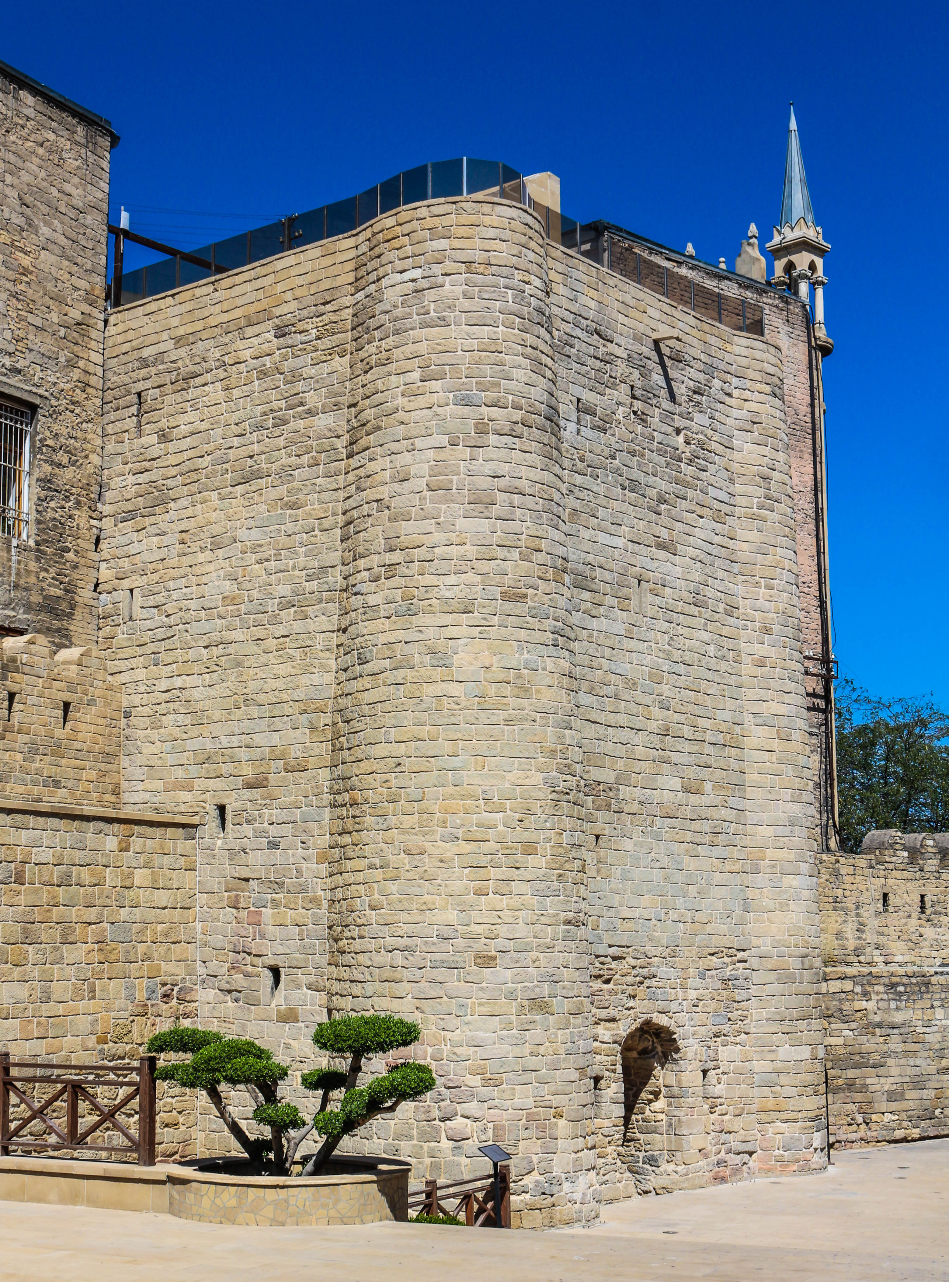 Dördbucaqlı qala